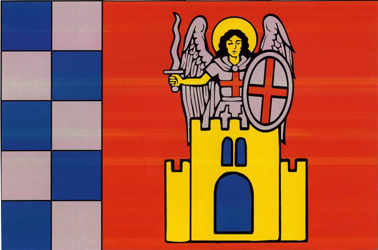 Bandera de San Miguel de Corneja, Ávila, España